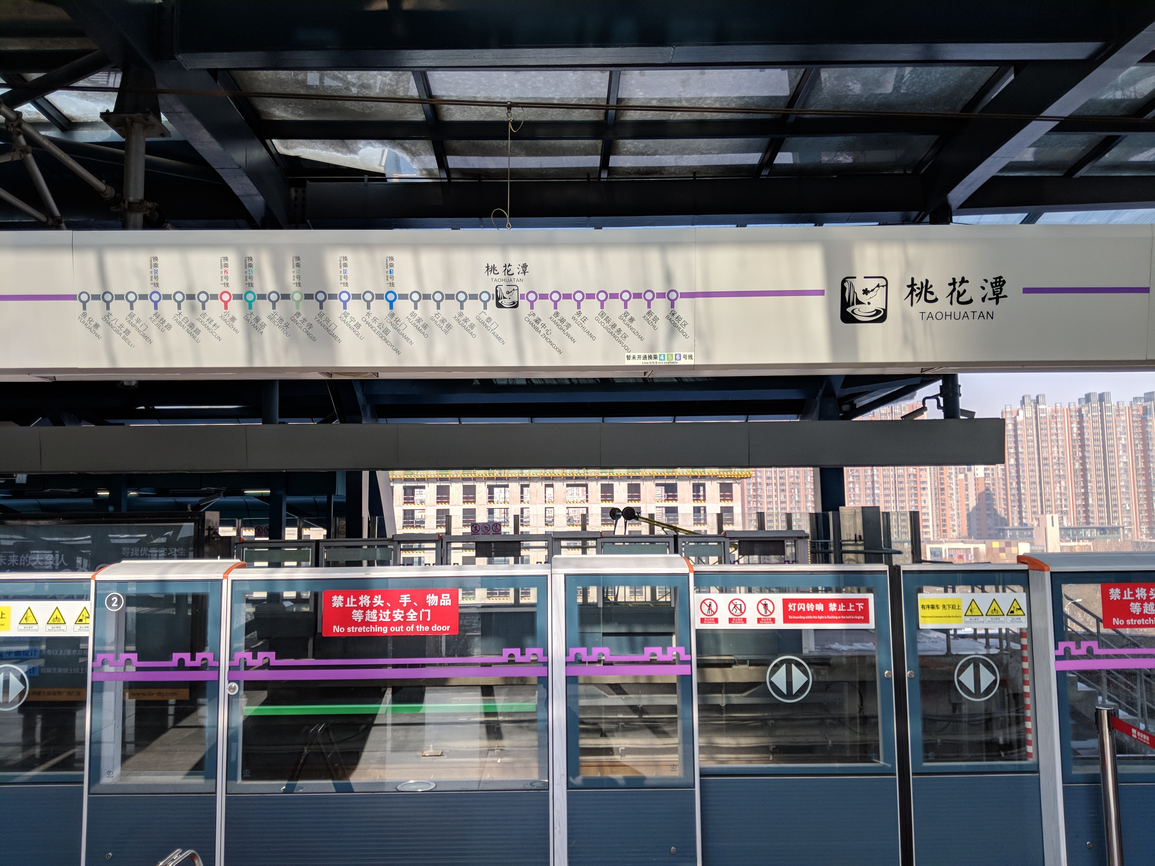 西安地铁3号线桃花潭站站台